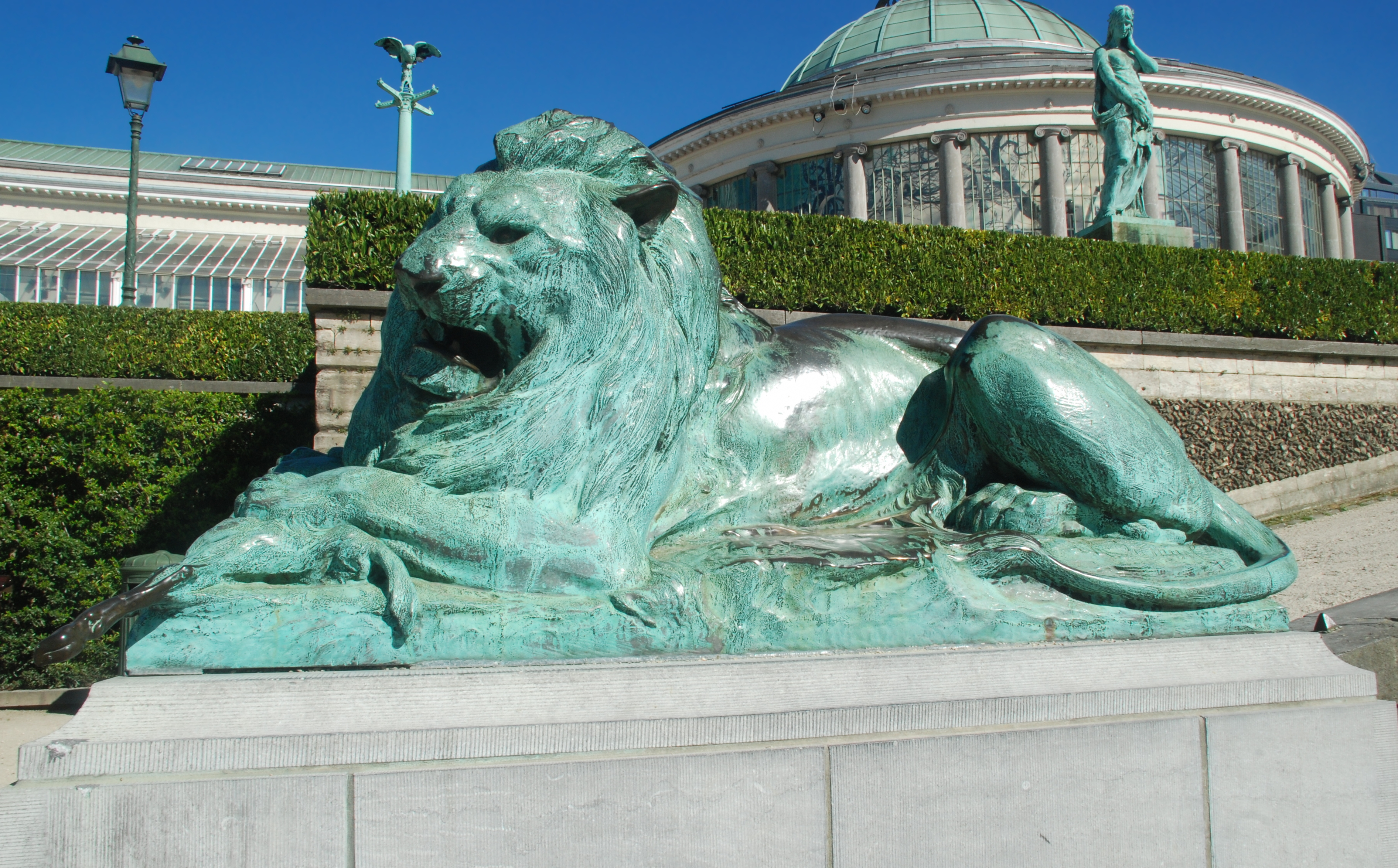 Belgique - Bruxelles - Jardin botanique de Bruxelles - Le Lion de Charles Samuel This photo of immovable heritage has been taken in the Brussels Capital Region